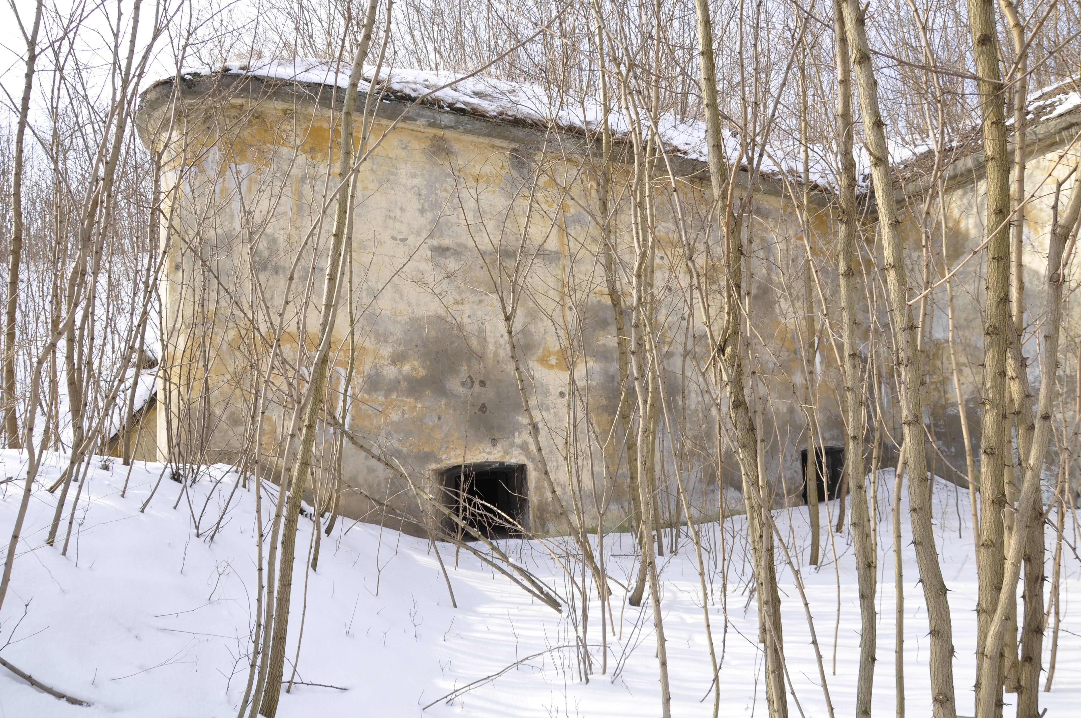 Traditor grosse Festung Zegrze Nordseite